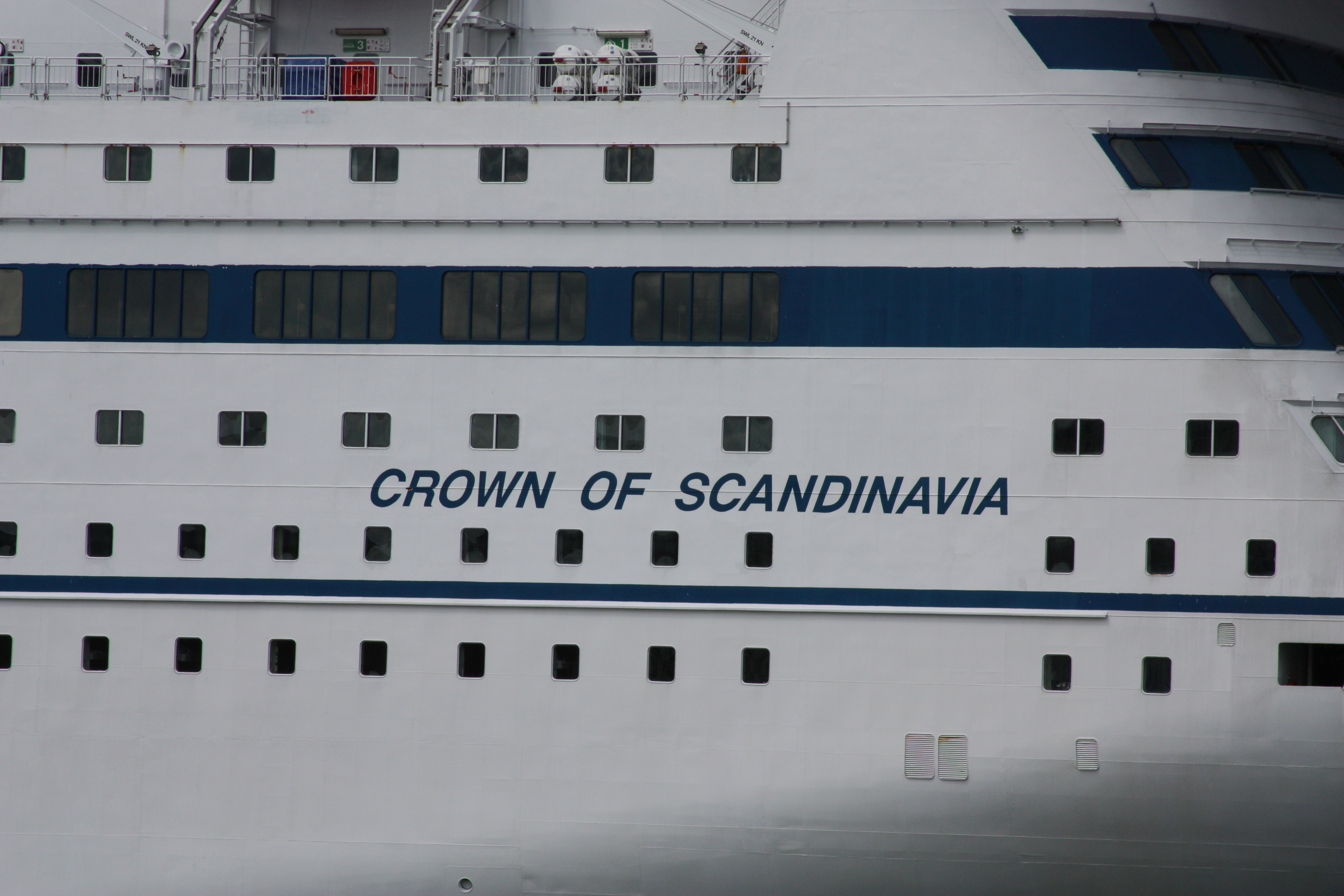 Das Schiff "Crown of Scandinavia" in Kopenhagen 2009